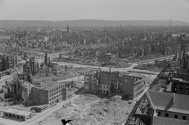 Original image description from the Deutsche Fotothek Blick von der Kreuzkirche über Gebäudetrümmer